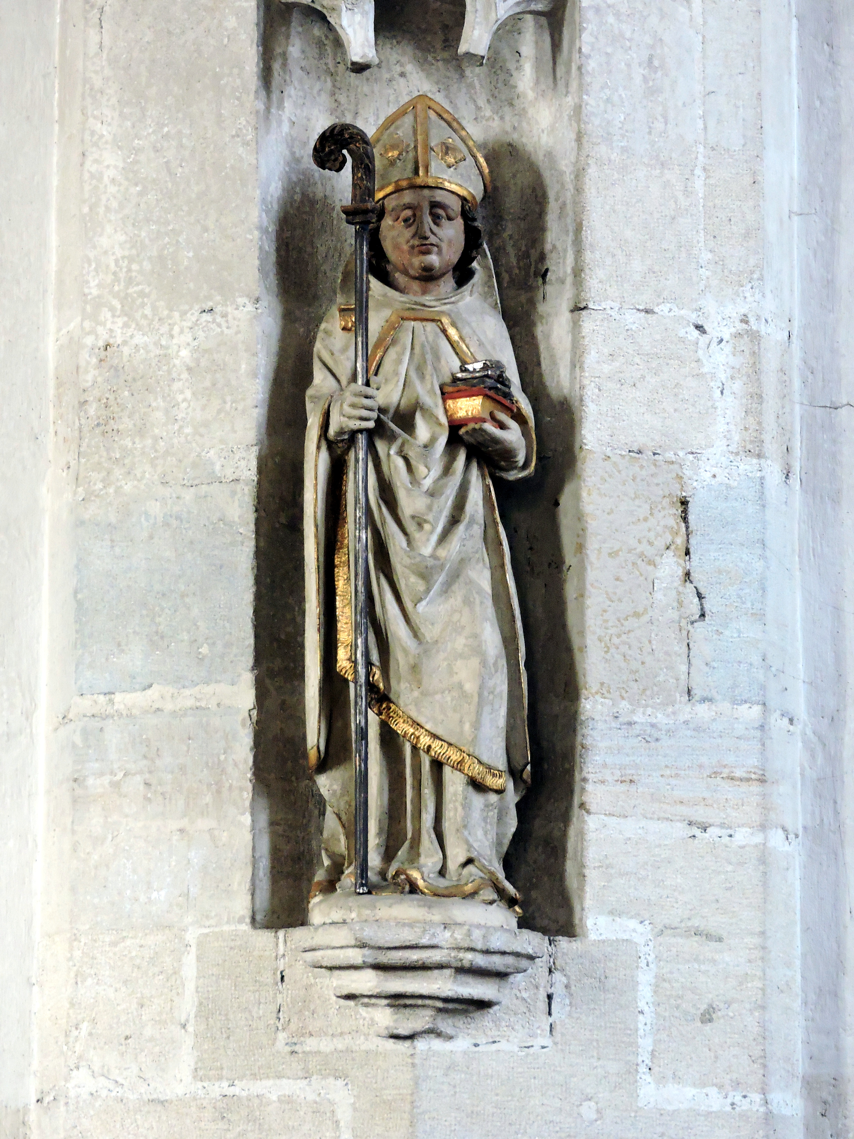 Kath. Pfarrkirche hl. Mauritius Figur des Hl.Godehard unter der Orgelempore